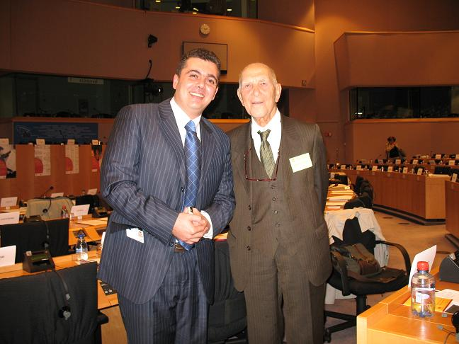 Tarif se encuentra con uno de los fundadores de la Declaración de Derechos Humanos de la ONU en el Parlamento Europeo